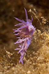 Classe:Gastropoda, Subclasse: Opistobranchia, Ordre: Nudibranchia, Subordre: Aeolidiina